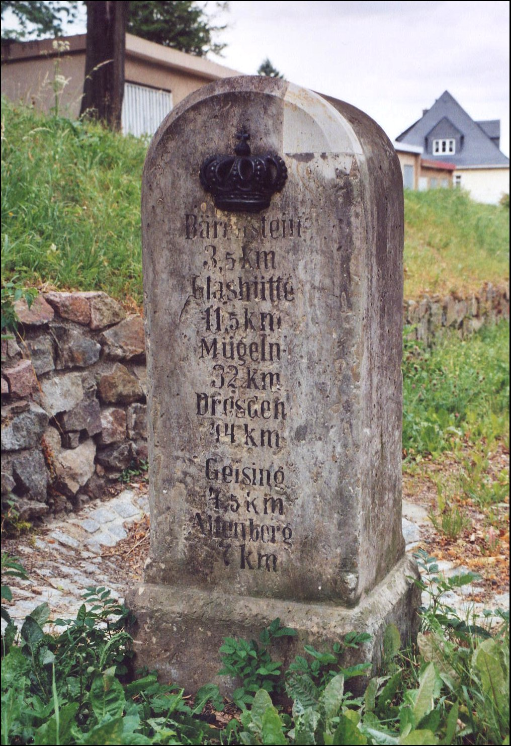 Lauenstein: königlich-sächsischer Meilenstein mit Entfernungsangaben über Bärenstein, Glashütte, Mügeln (Heidenau) nach Dresden bzw. über Geising nach Altenberg